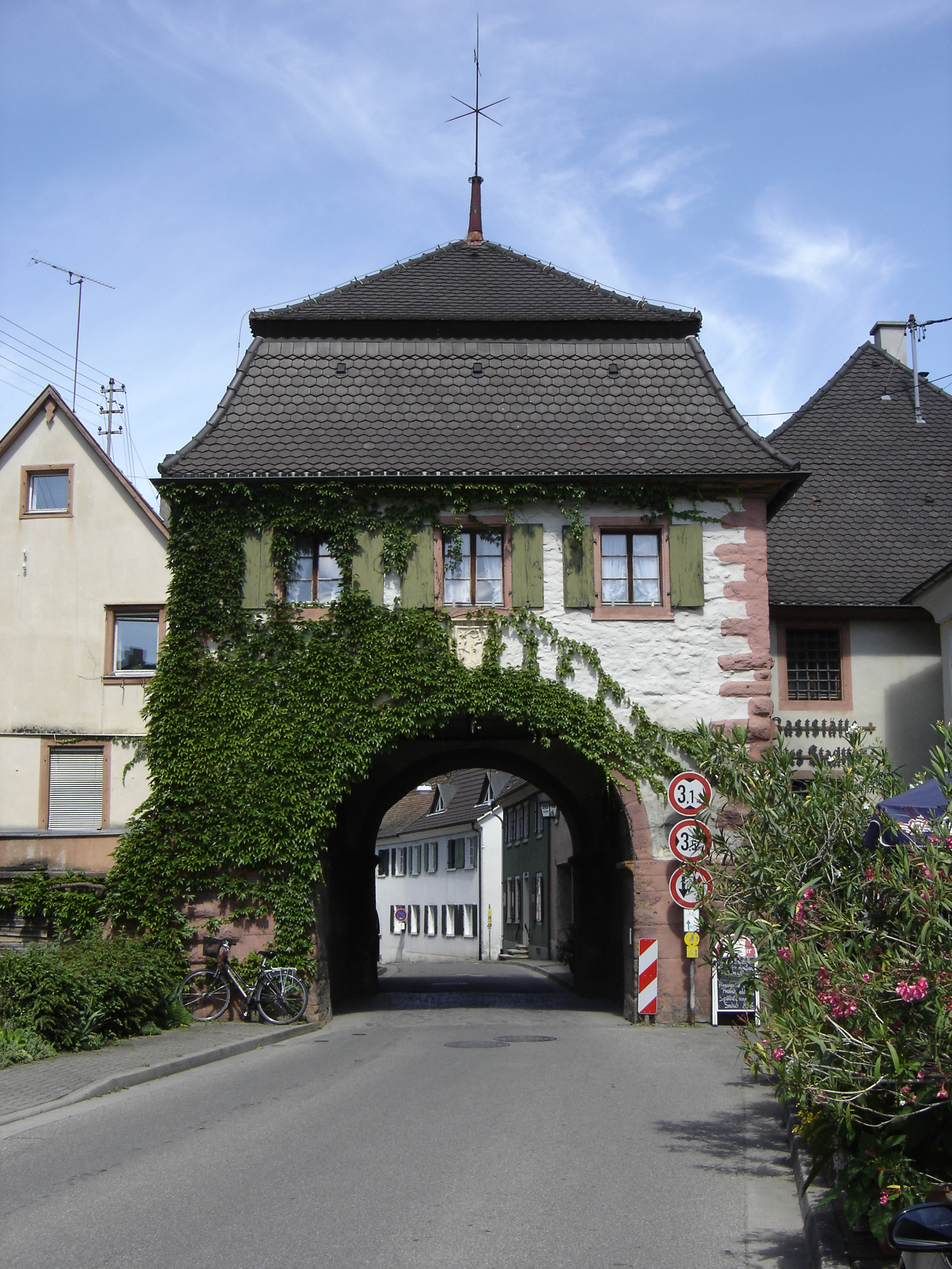 Das Stadttor in Sulzburg